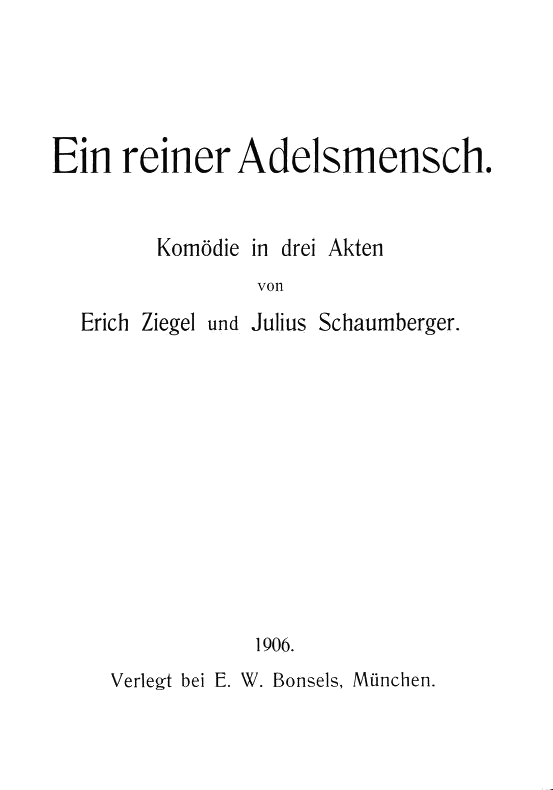 Titelblad i s/h til Ein reiner Adelsmensch. Komödie in drei Akten von Erich Ziegel und Julius Schaumberger. E.W. Bonsel, Buch-Verlag. München-Schwabing, 1906